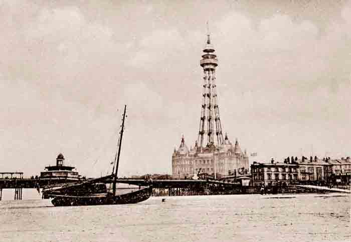 la tour de New Brighton en Angleterre au début du siècle.